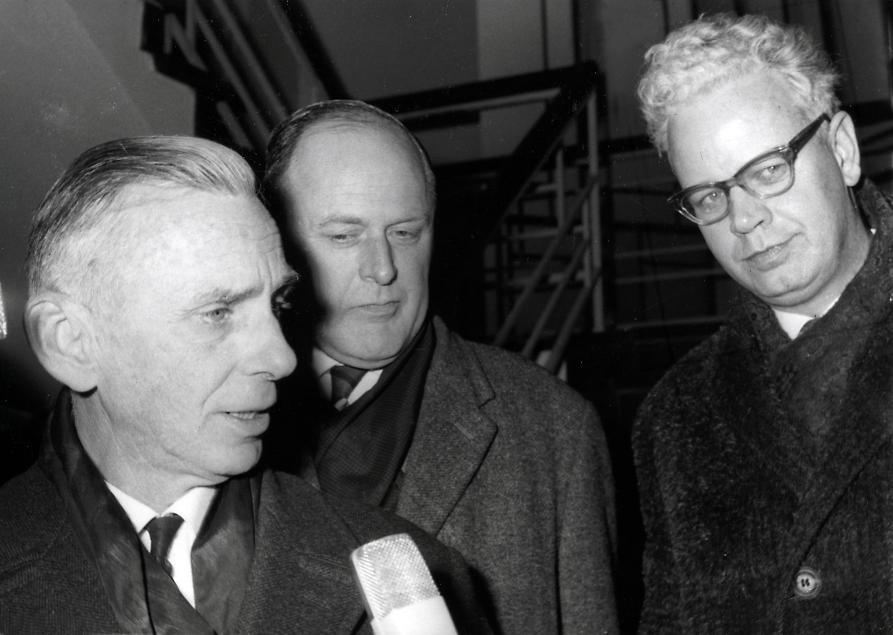 Vlnr de heren Bosma, P.S. Pels en dhr. Roemers, voorzitters van de Stichting van de Arbeid, bij de bekendmaking van de regering inzake lonen en belasting. Nederland, 1 december 1964.